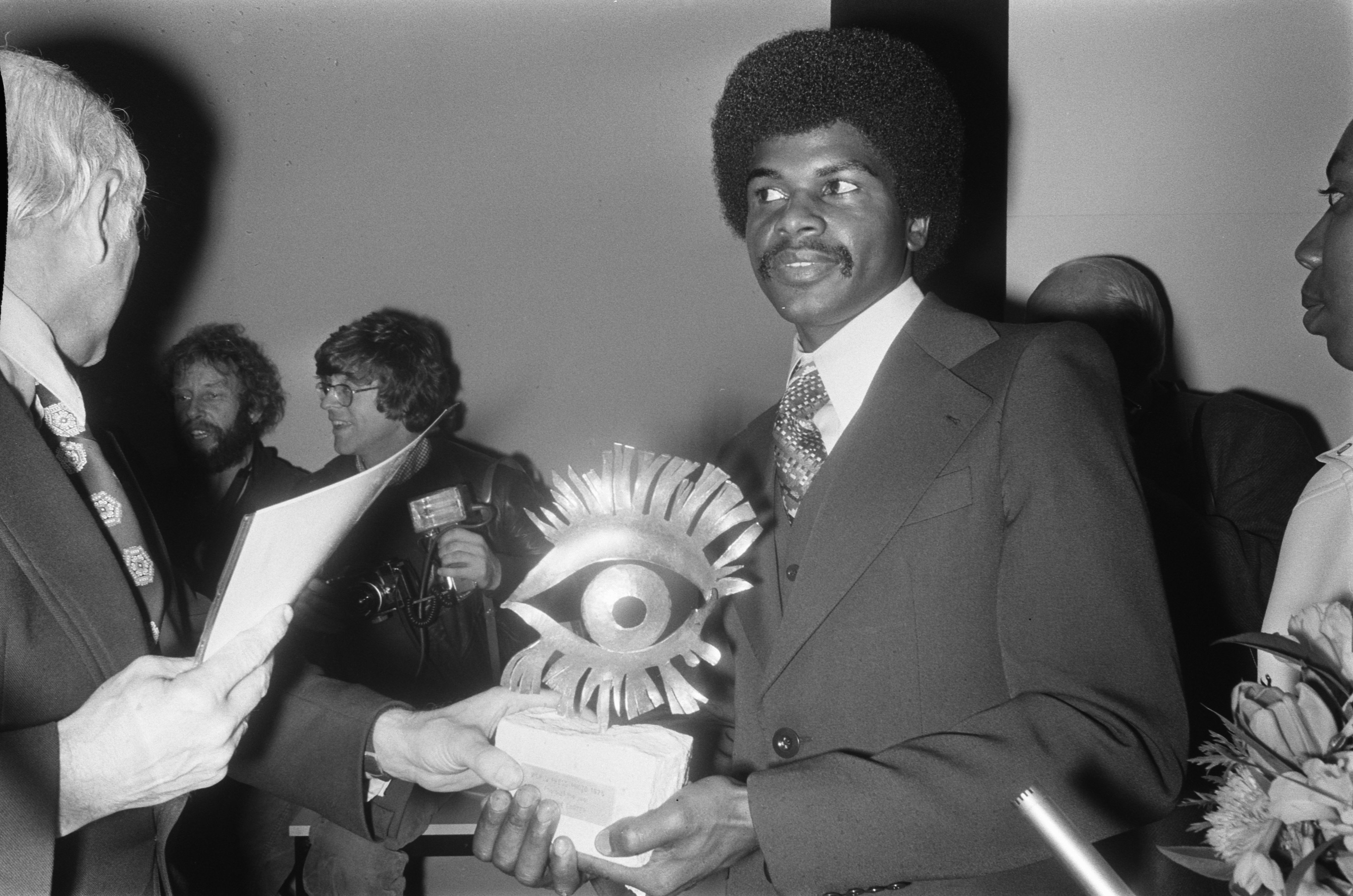 Collectie / Archief : Fotocollectie Anefo Reportage / Serie : [ onbekend ] Beschrijving : Premier Den Uyl reikt eerste prijs uit aan winnaar World Press Photo 75 in Van Goghmuseum Amsterdam; premier Den Uyl en winnaar Ovie Carter / Datum : 16 april 1975 Locatie : Amsterdam, Noord-Holland Trefwoorden : fotografie, musea, premiers, prijsuitreikingen Persoonsnaam : Uyl, Joop den Instellingsnaam : Rijksmuseum Vincent van Gogh, World Press Photo Fotograaf : Peters, Hans / Anefo Auteursrechthebbende : Nationaal Archief Materiaalsoort : Negatief (zwart/wit) Nummer archiefinventaris : bekijk toegang 2.24.01.05 Bestanddeelnummer : 927-8757